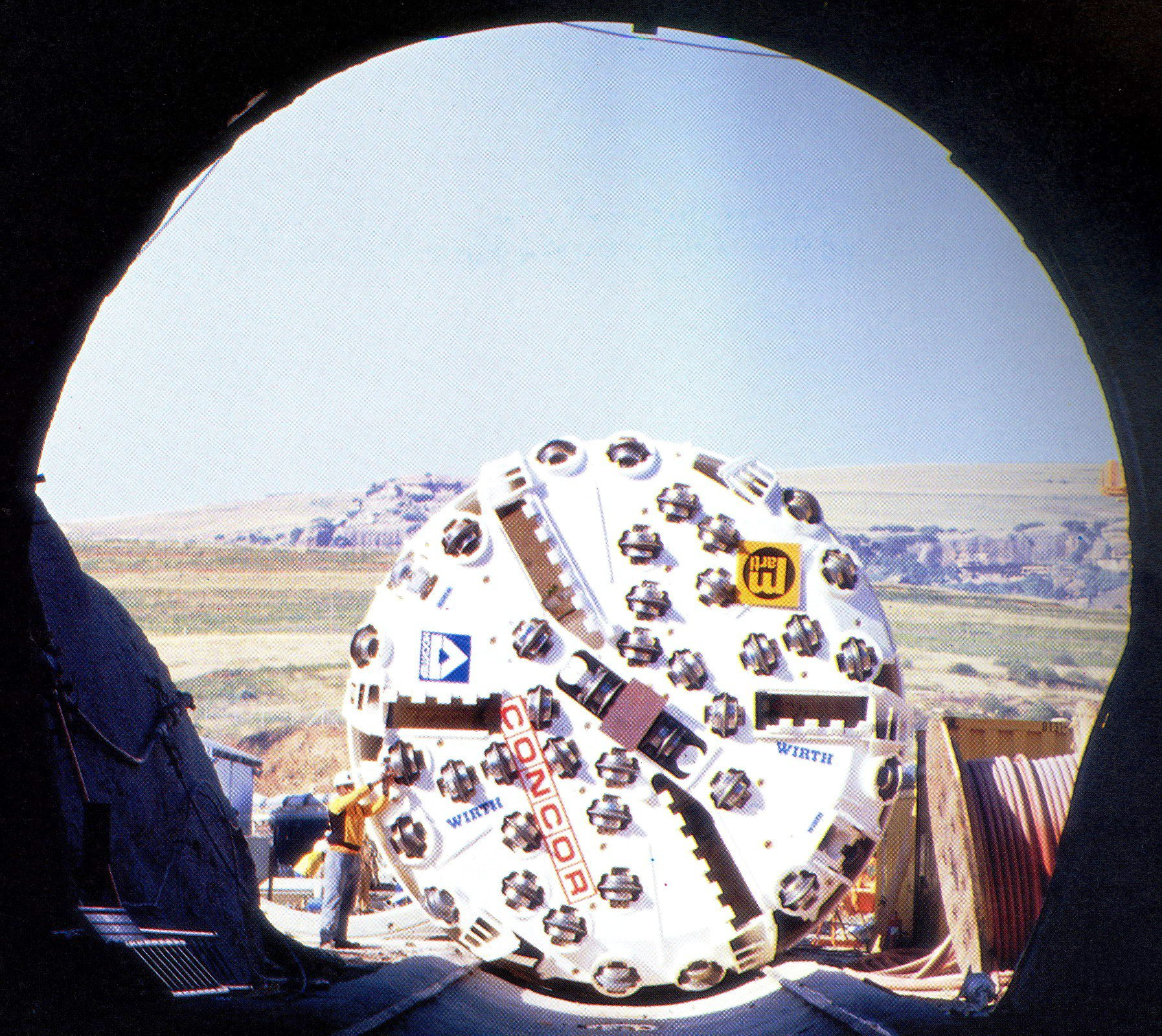 A pajzs mérete